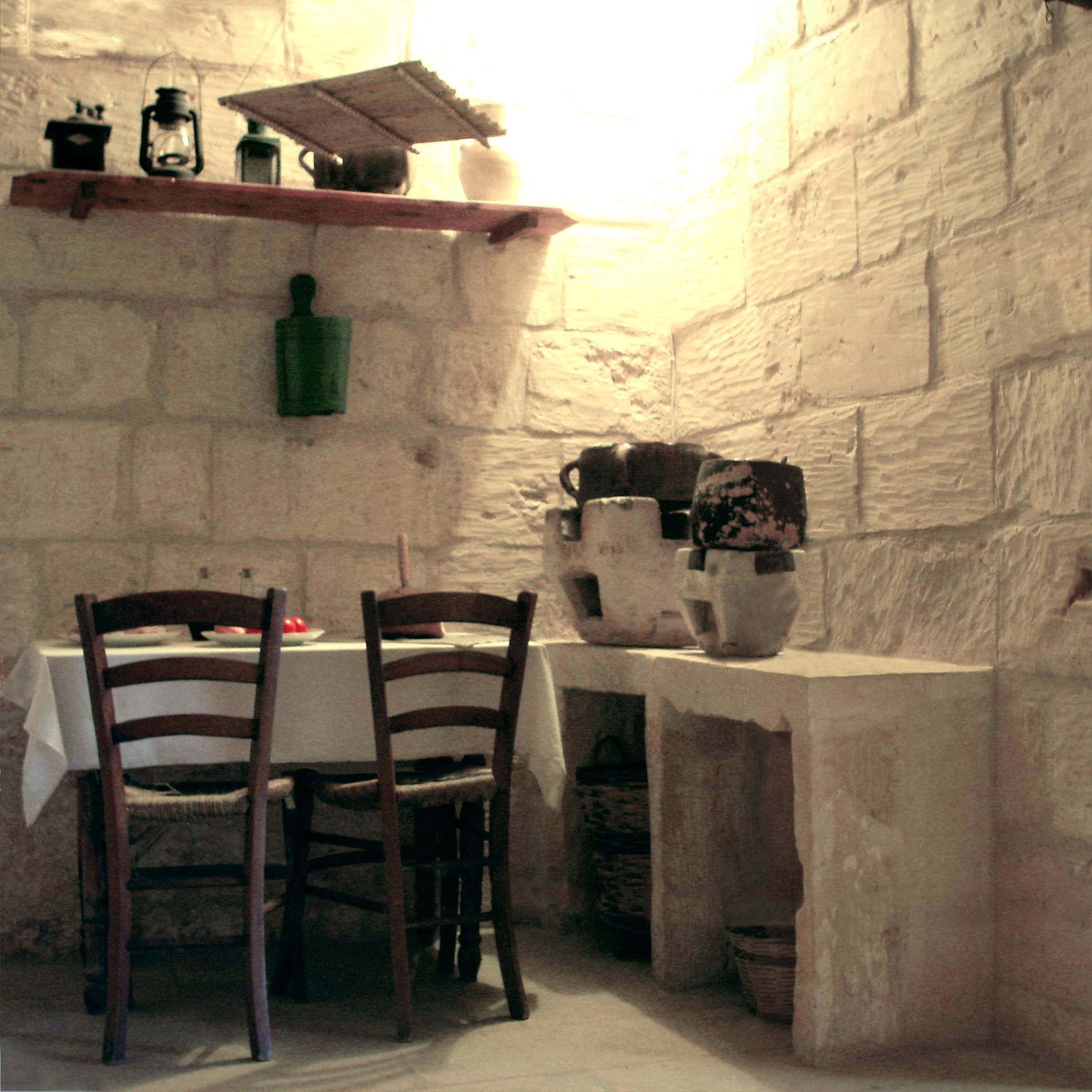 coin cuisine d'une ferme traditionnelle maltaise avec deux "kwiener" (brasero)